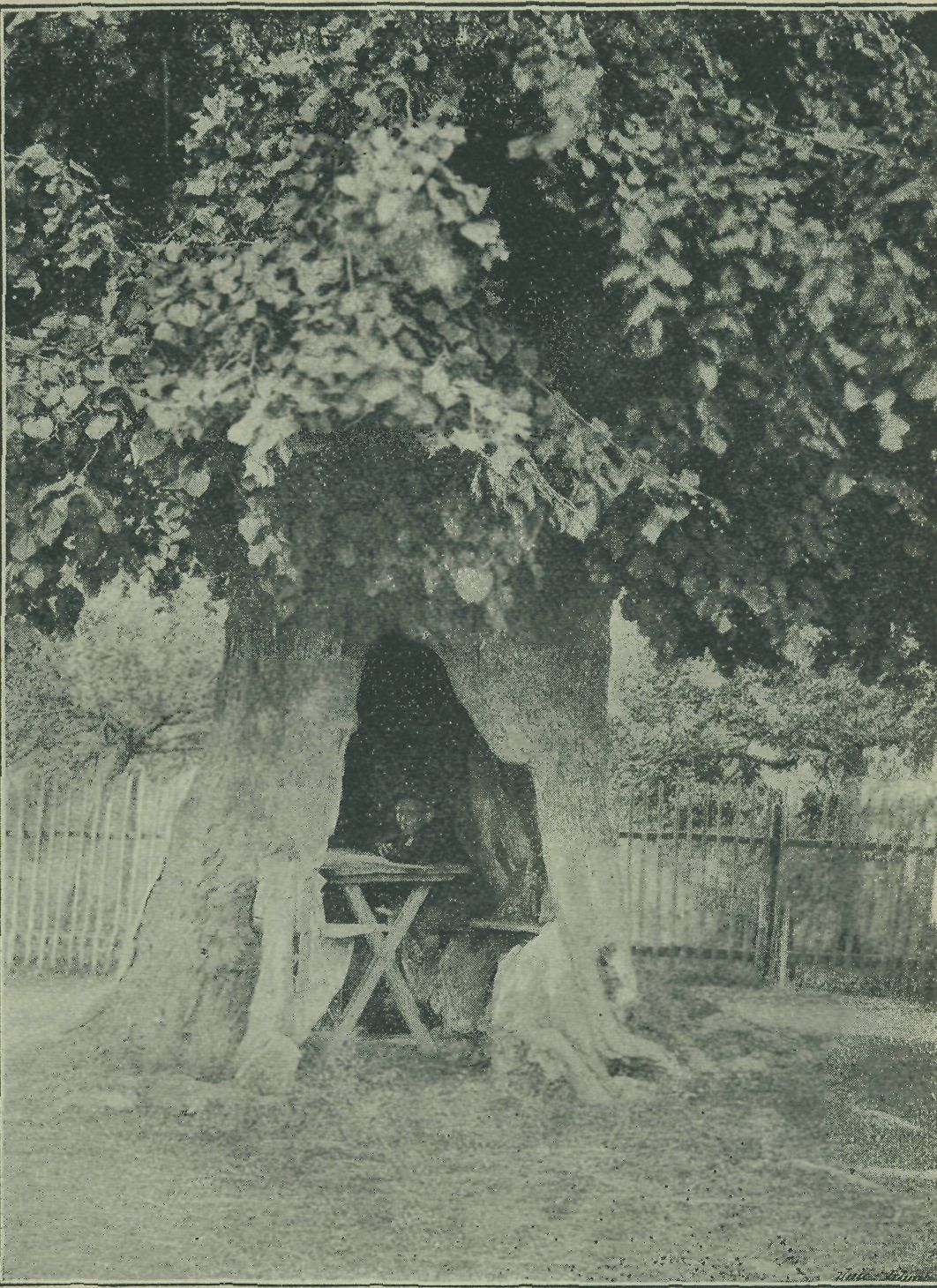 Lánská lípa, památná lípa v Lánech (okres Havlíčkův Brod), historická fotografie, autor Jan Vilím